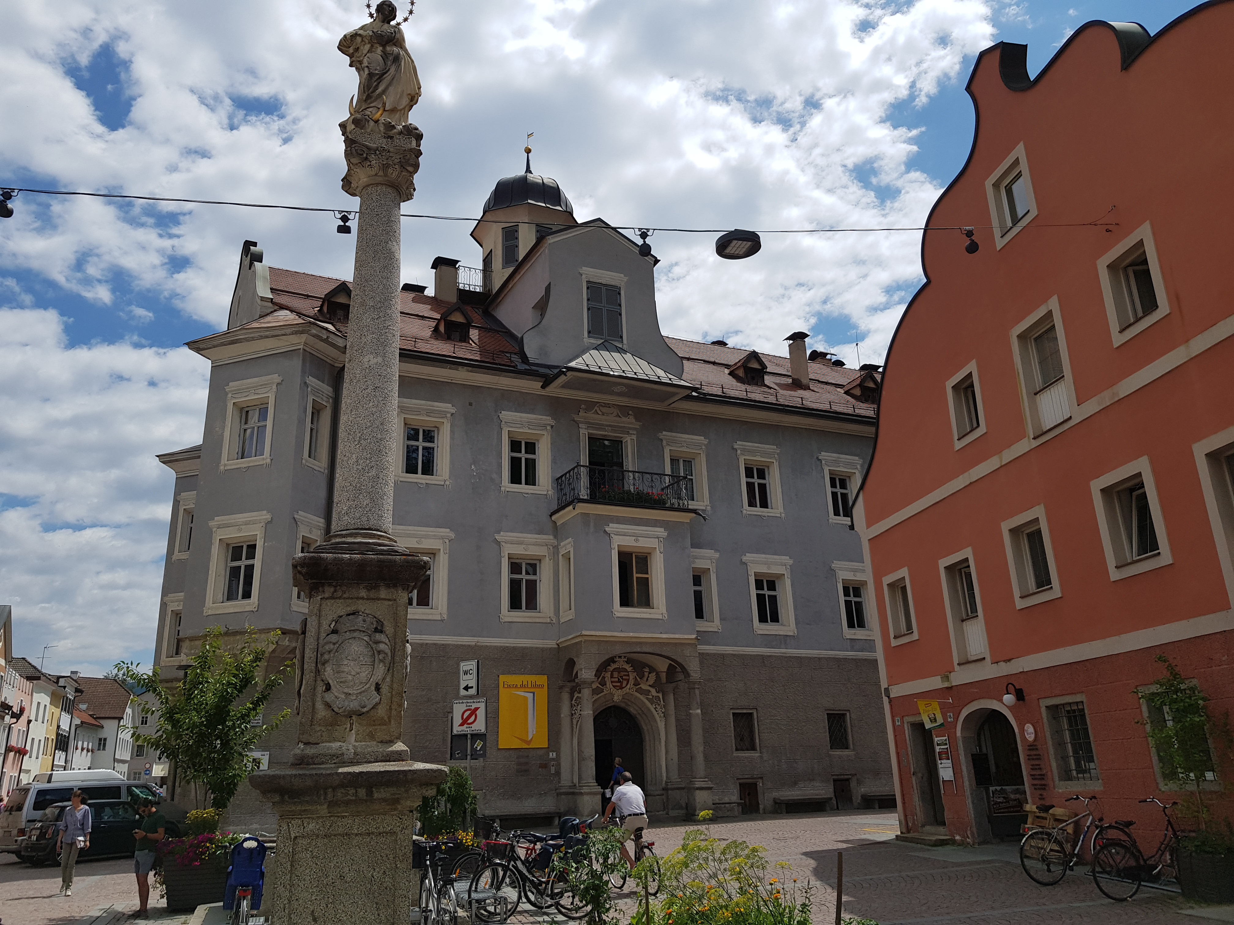 Mariensäule, dahinter Palais Sternbach, Oberragen, Bruneck, Südtirol